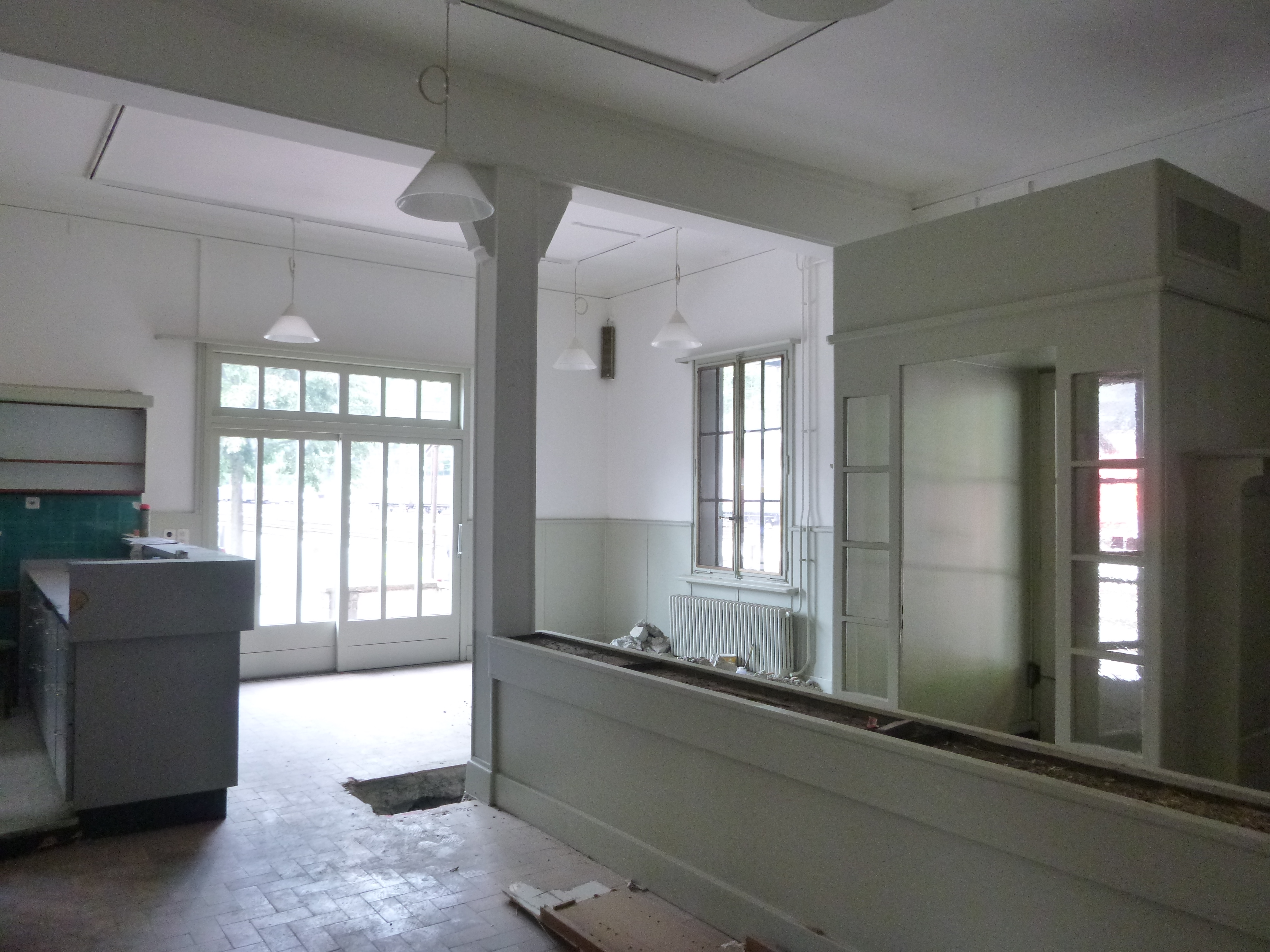 Das Bahnhofrestaurant Biasca vor dem Umbau 2019